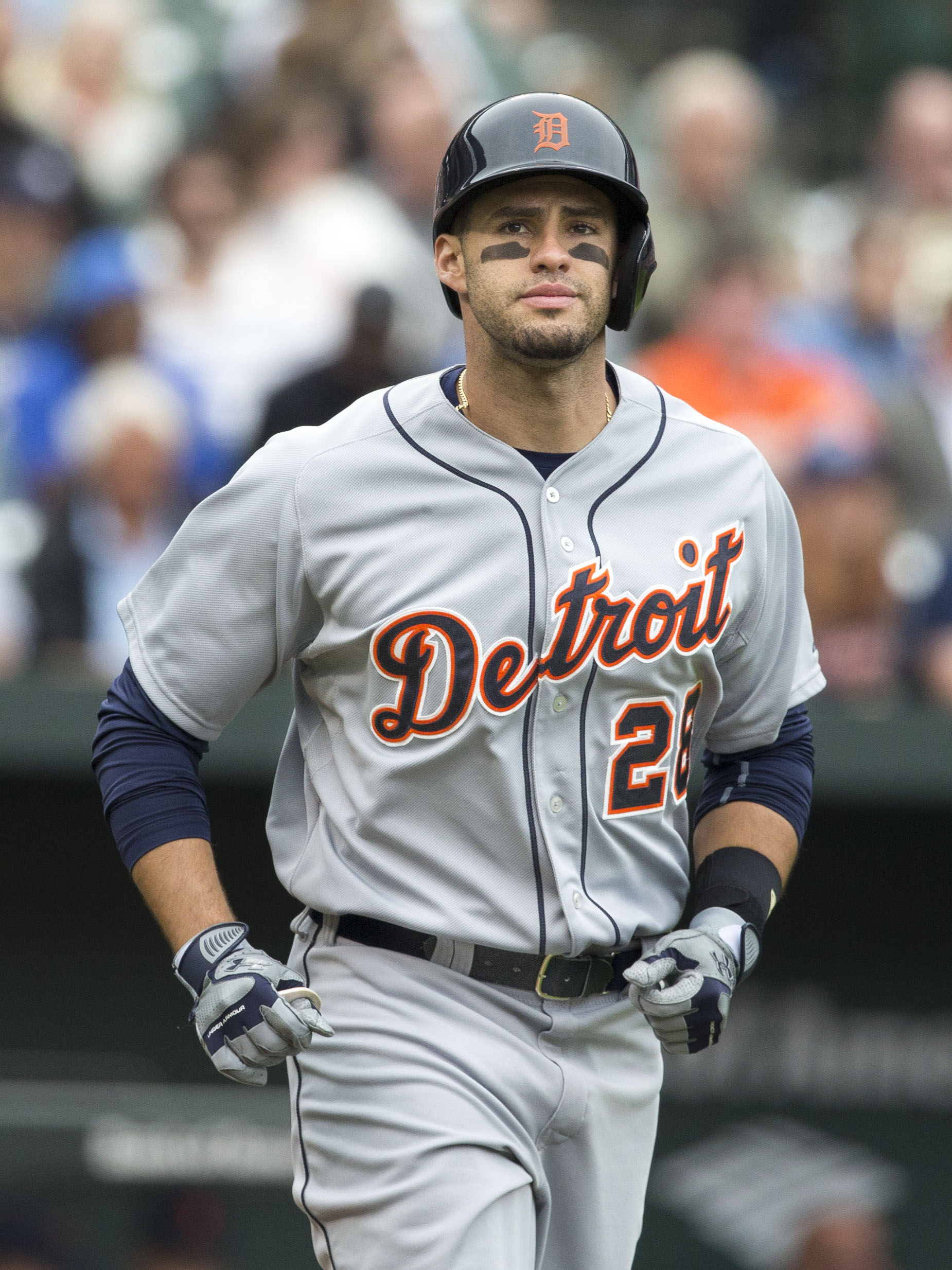 J. D. Martinez